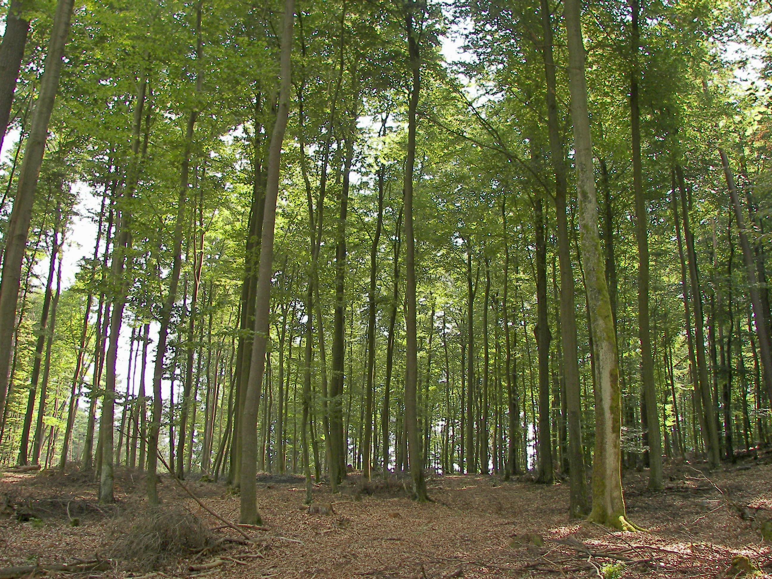 Buchenwald im Burgwald (Buntsandstein), Hessen, am 23.07.2006